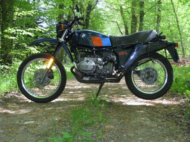 R 80 G/S Pacific Blue Metallic Francesco